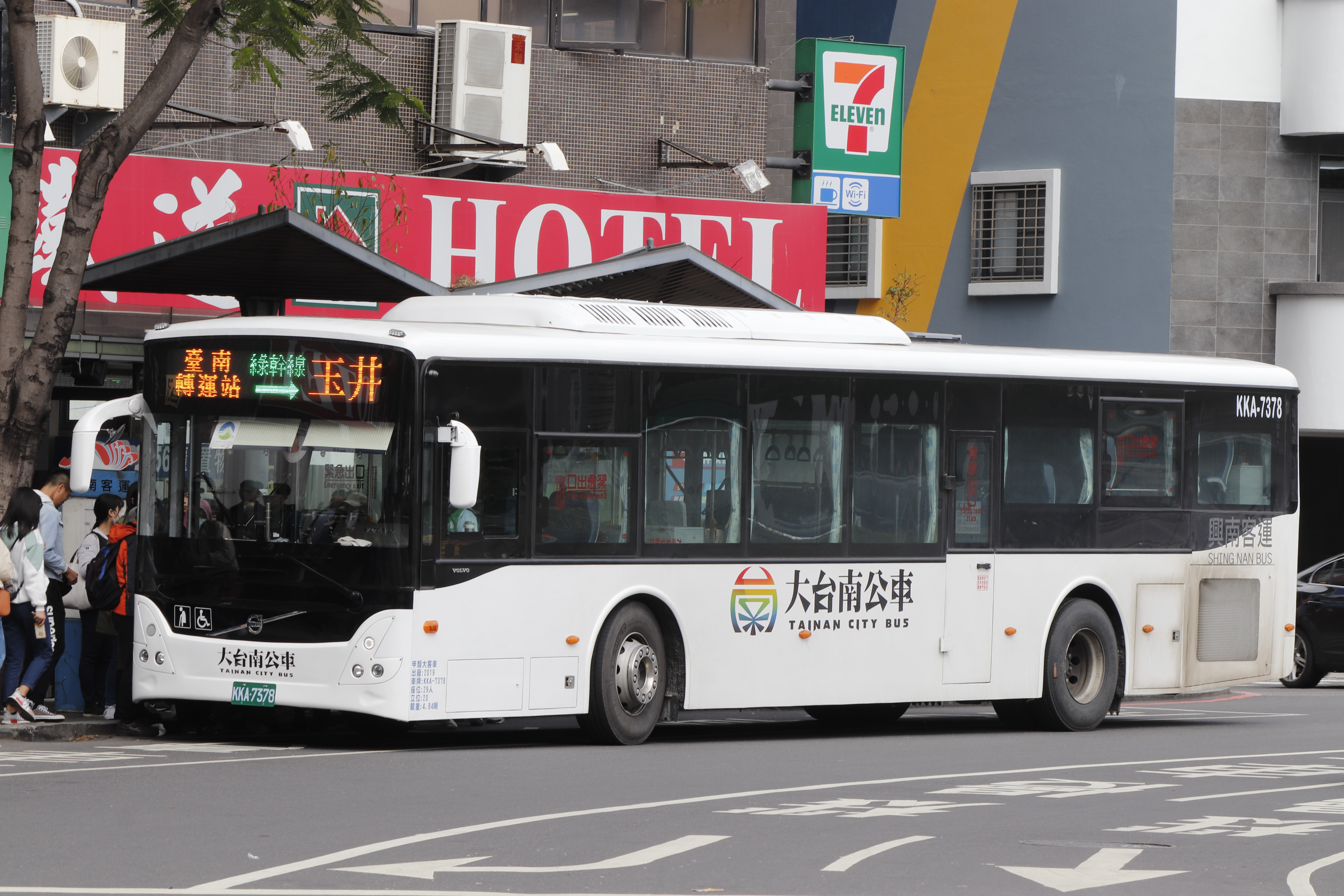 興南客運 KKA-7378